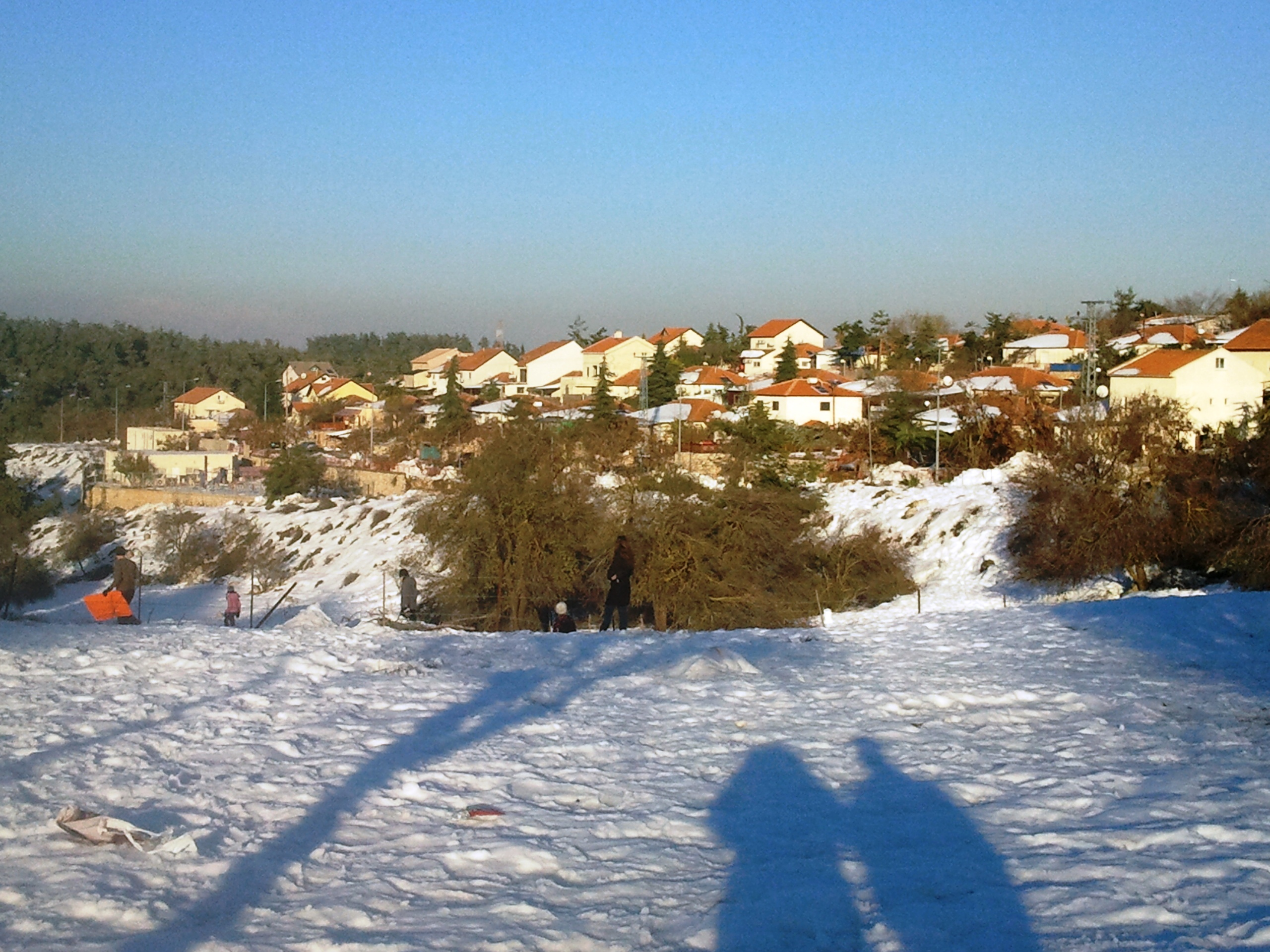 ביריה שבוע לאחר סופת השלג בדצמבר 2913